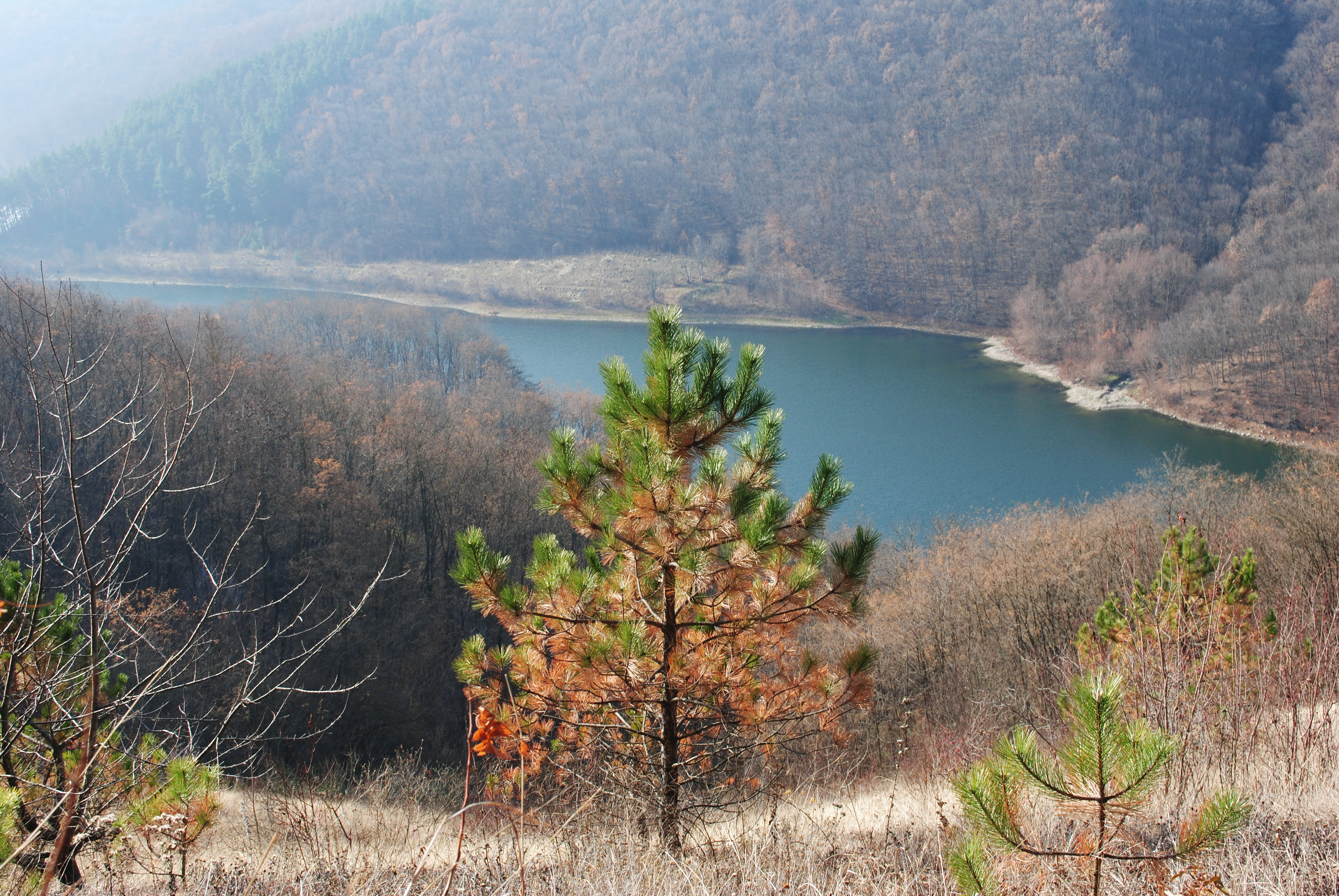 Типовий ландшафт